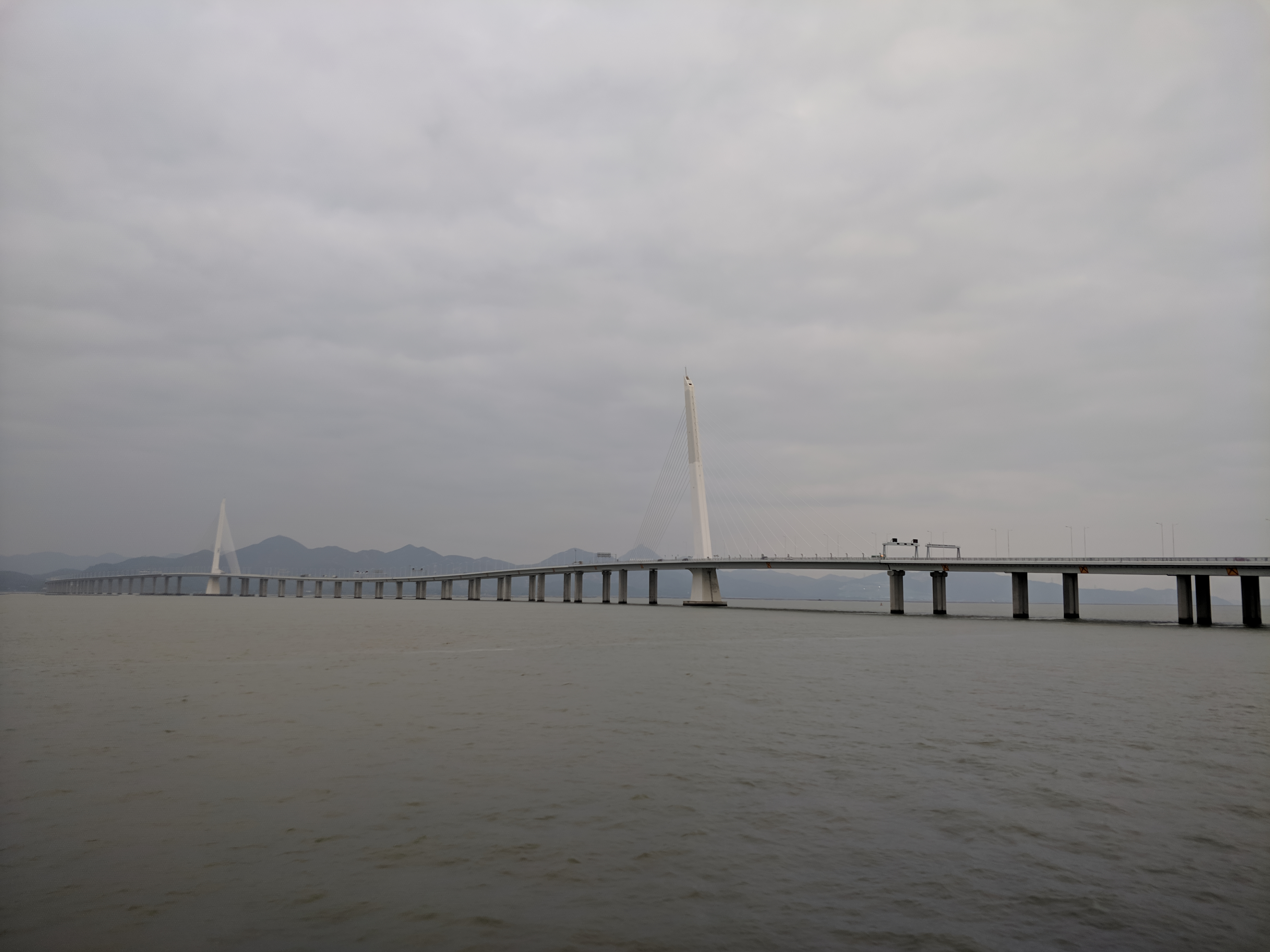 中文（中国大陆）: 深圳湾所拍摄的深圳湾公路大桥景色